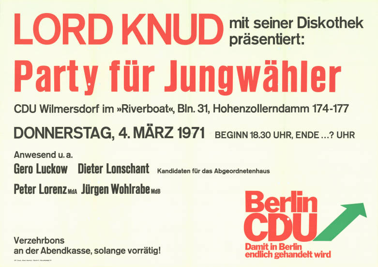 Lord Knud mit seiner Diskothek präsentiert: Party für Jungwähler .. Anwesend u.a. Gero Luckow Dieter Lonschant Kandidaten für das Abgeordnetenhaus Peter Lorenz MdA Jürgen Wohlrabe MdB ... Berlin CDU Damit in Berlin endlich gehandelt wirdPlakatart:AnkündigungsplakatDrucker_Druckart_Druckort:1971 Druck: Albert Hentrich, Berlin-SteglitzObjekt-Signatur:10-004 : 401Bestand:Plakate zu Abgeordnetenhauswahlen Berlin (10-004)GliederungBestand10-18:Plakate zu Abgeordnetenhauswahlen Berlin (10-004) » CDULizenz:KAS/ACDP 10-004 : 401 CC-BY-SA 3.0 DE